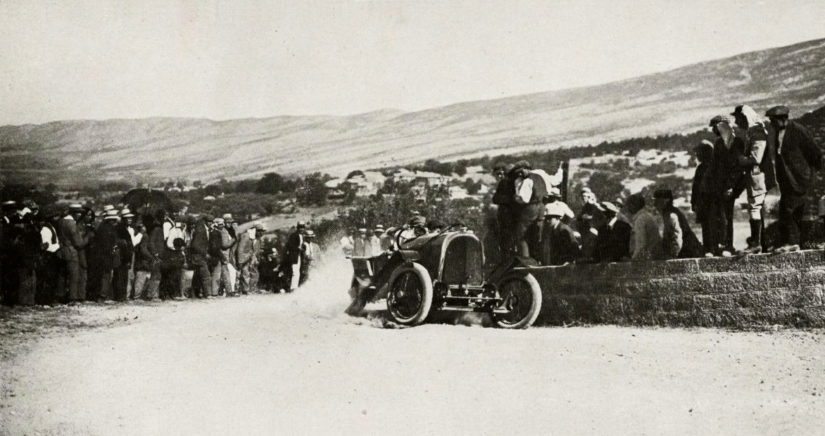 Paul Bablot vainqueur une troisième fois en 13 ans au Ventoux, en 1921 sur Voisin 3L - Le Sport Universel Illustré du 12 août 1921, p.981